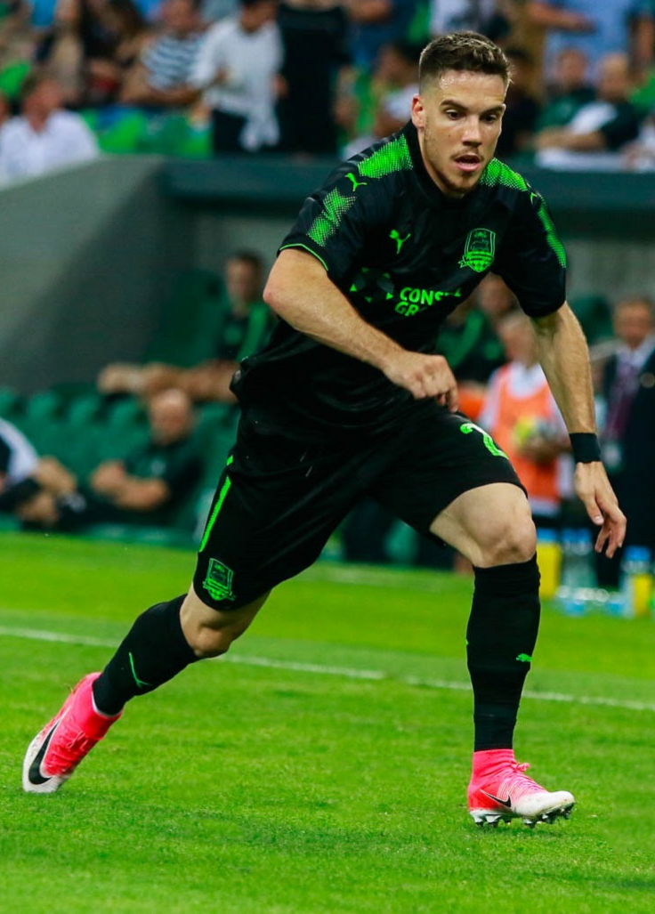 «Краснодар» - «Люнгбю»